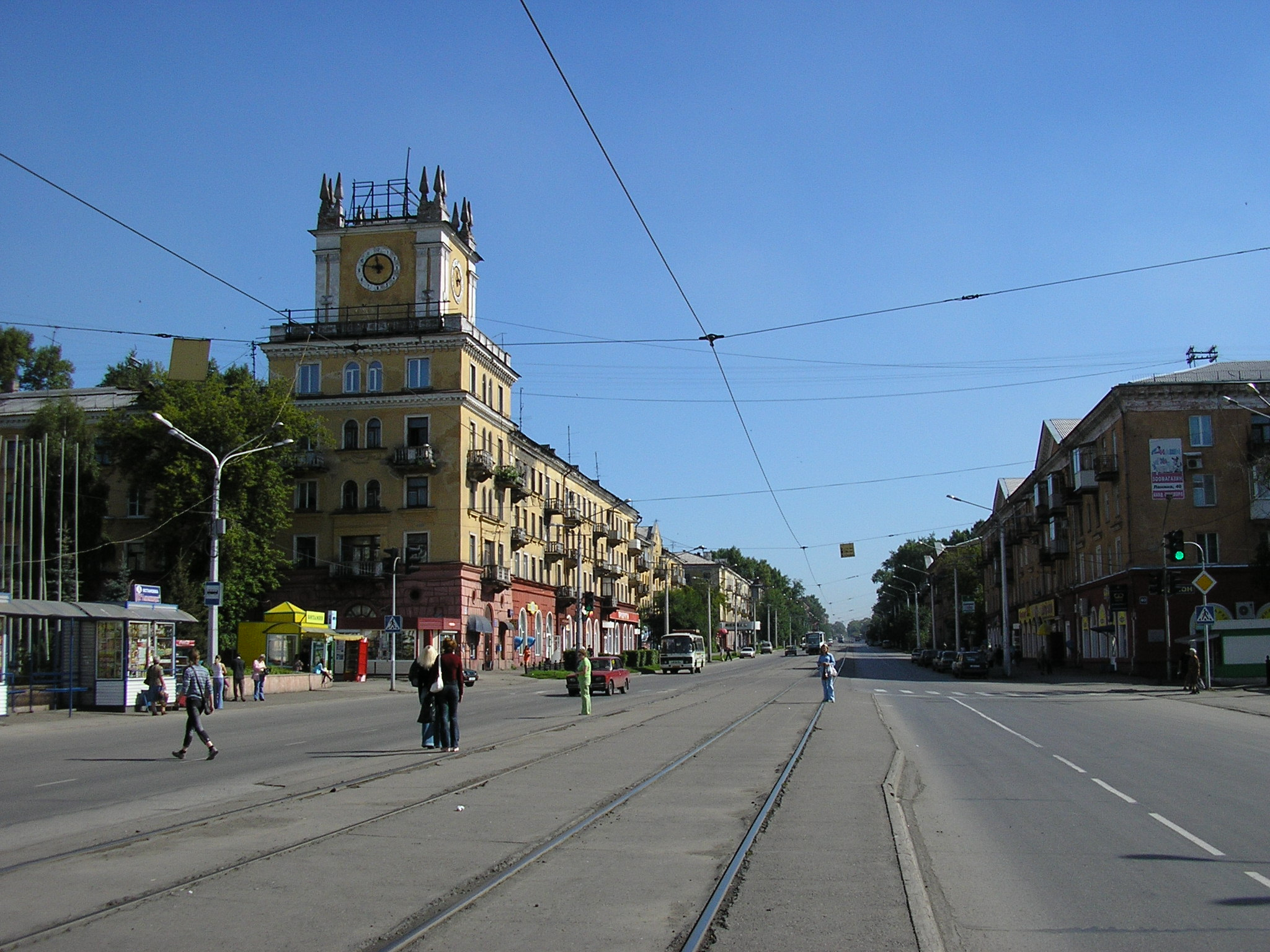 Ул. Ленина